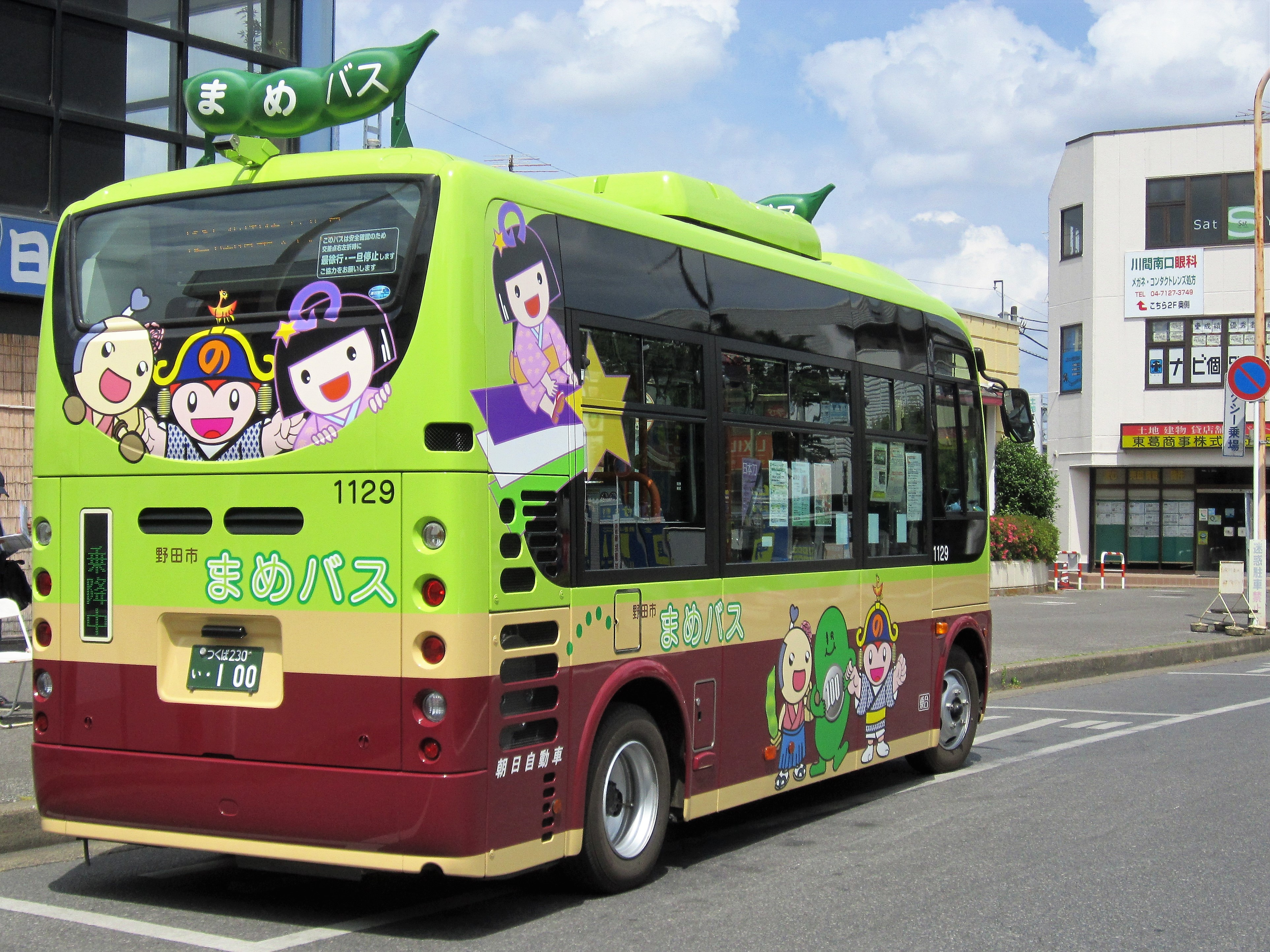 まめバス（朝日自動車車両、川間駅南口） Canon PowerShot A2200